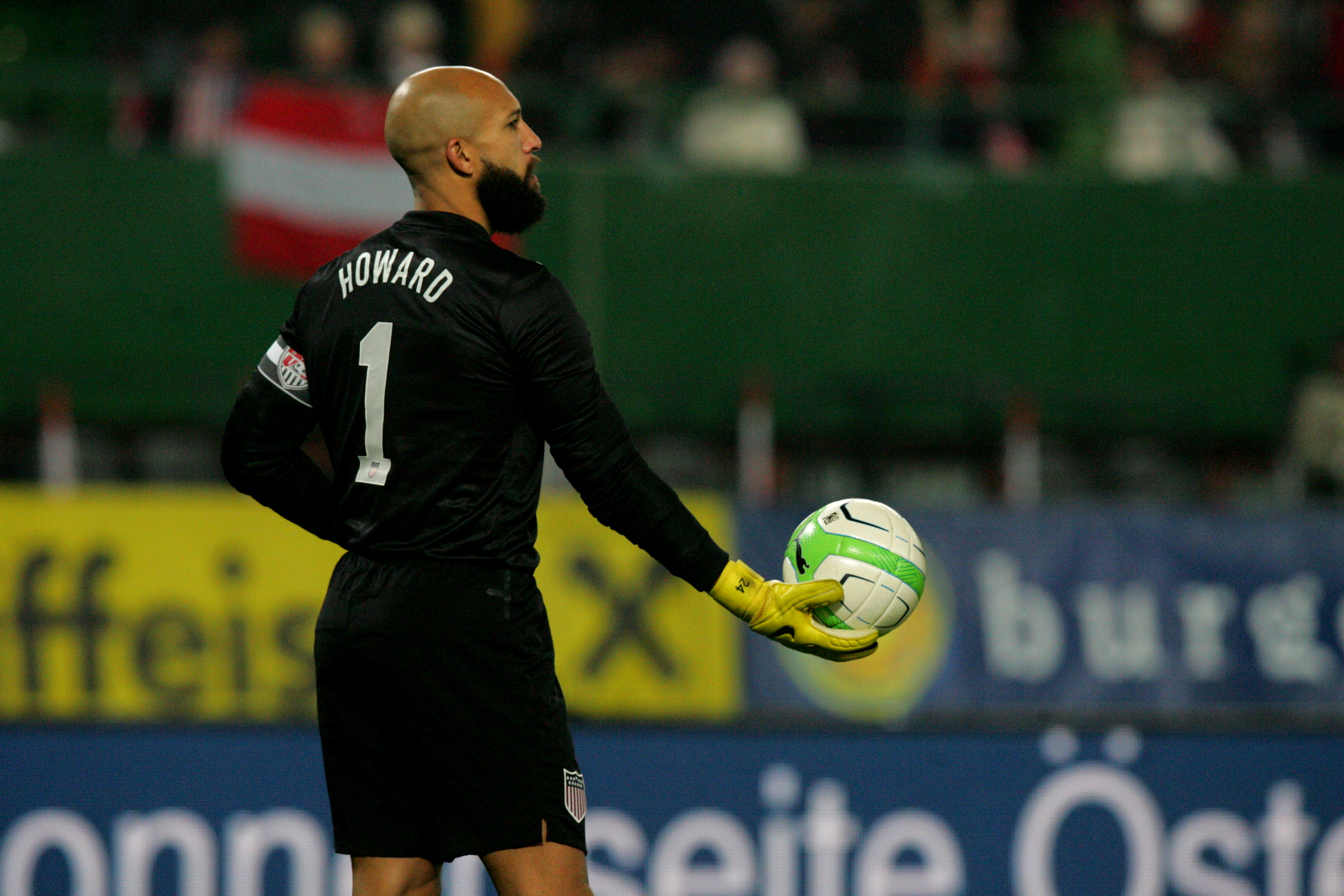 Freundschaftliches Länderspiel Österreich - USA 19.11.2013 in Wien: Tim Howard